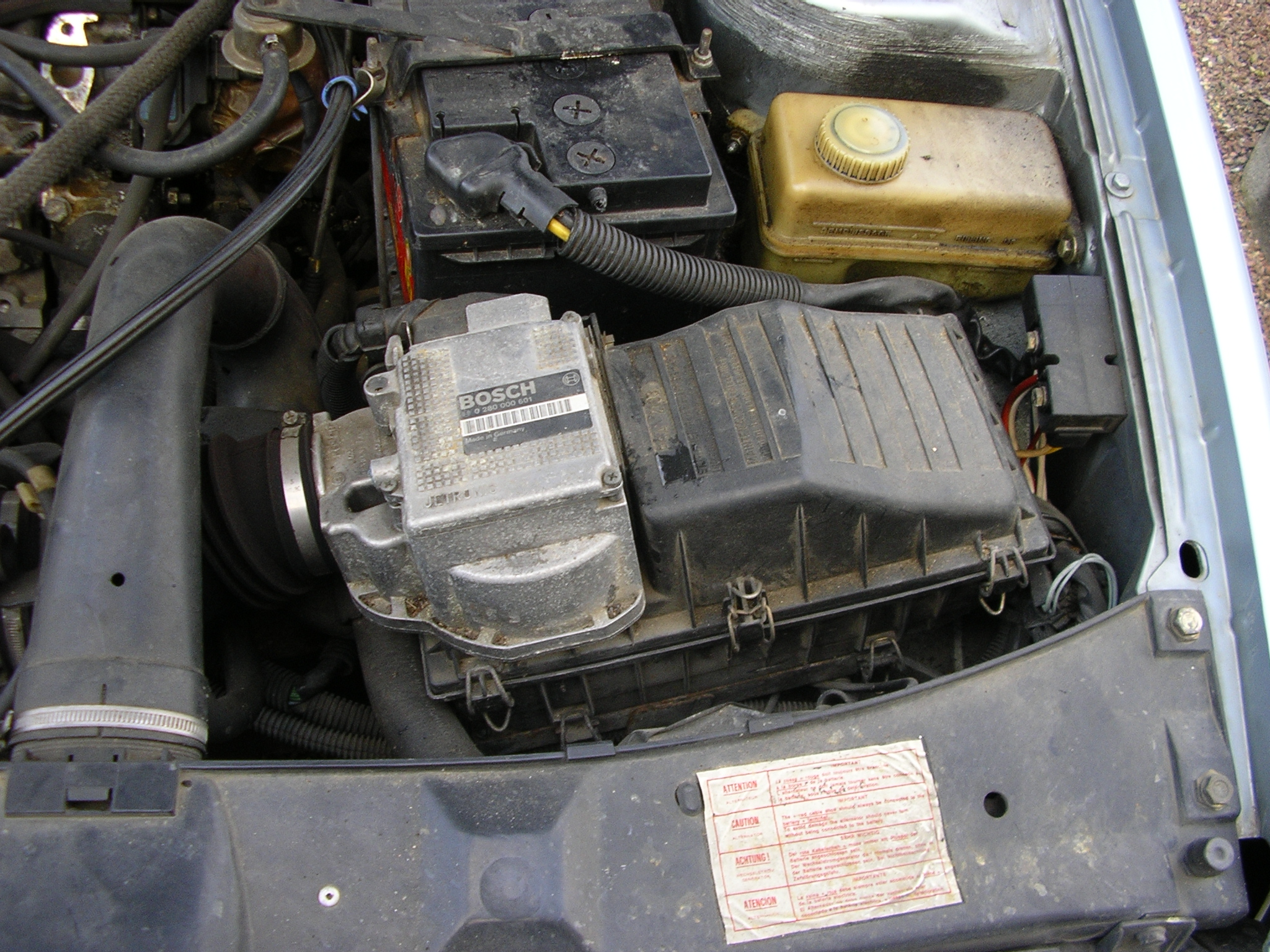 Bosch LE2-Jetronic (calculateur, débitmètre et boîte à air) tel que monté sur les Peugeot 405 SRi (1998-1992)